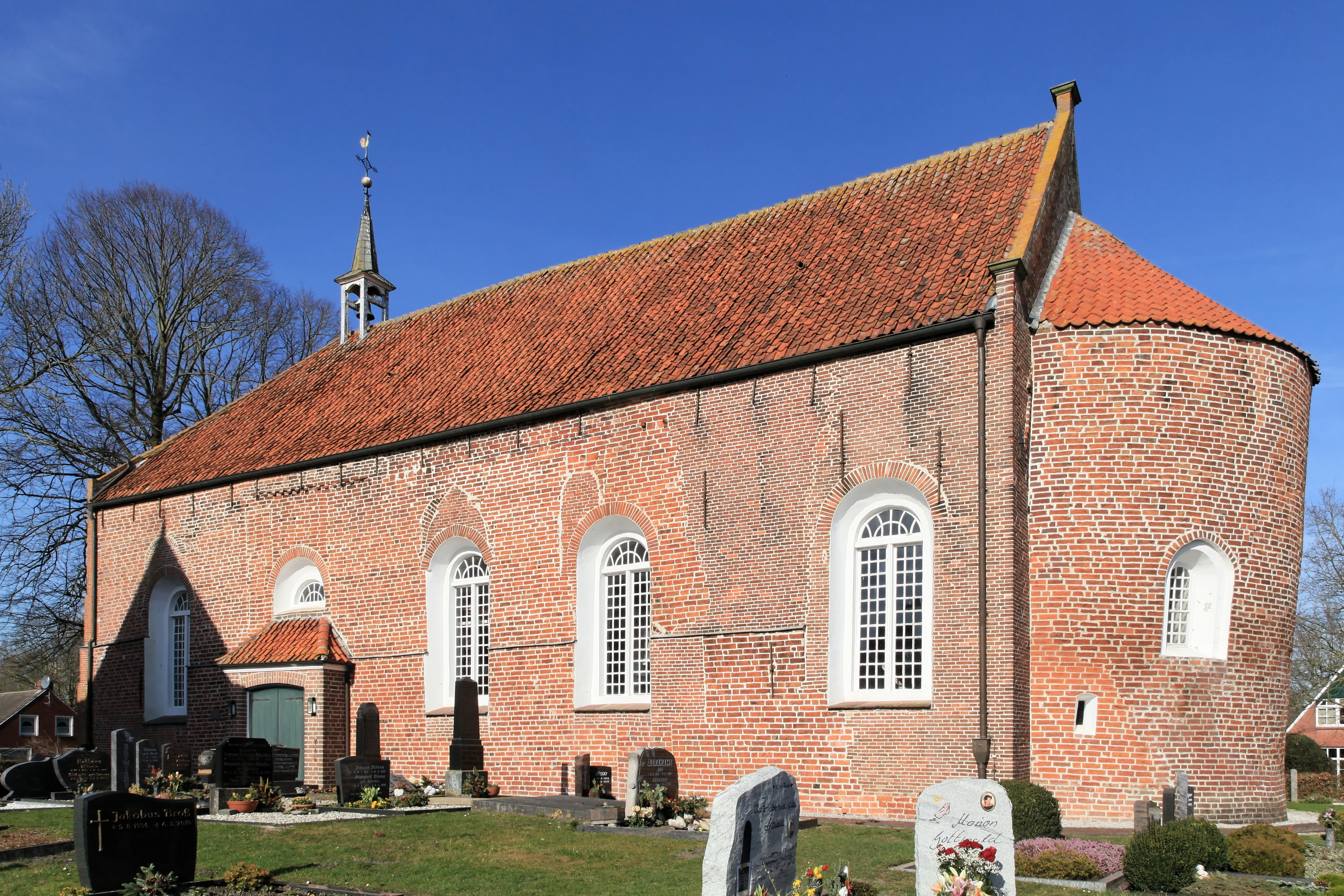 Friedhof und Kirche, Denkmalstraße in Midlum, Jemgum